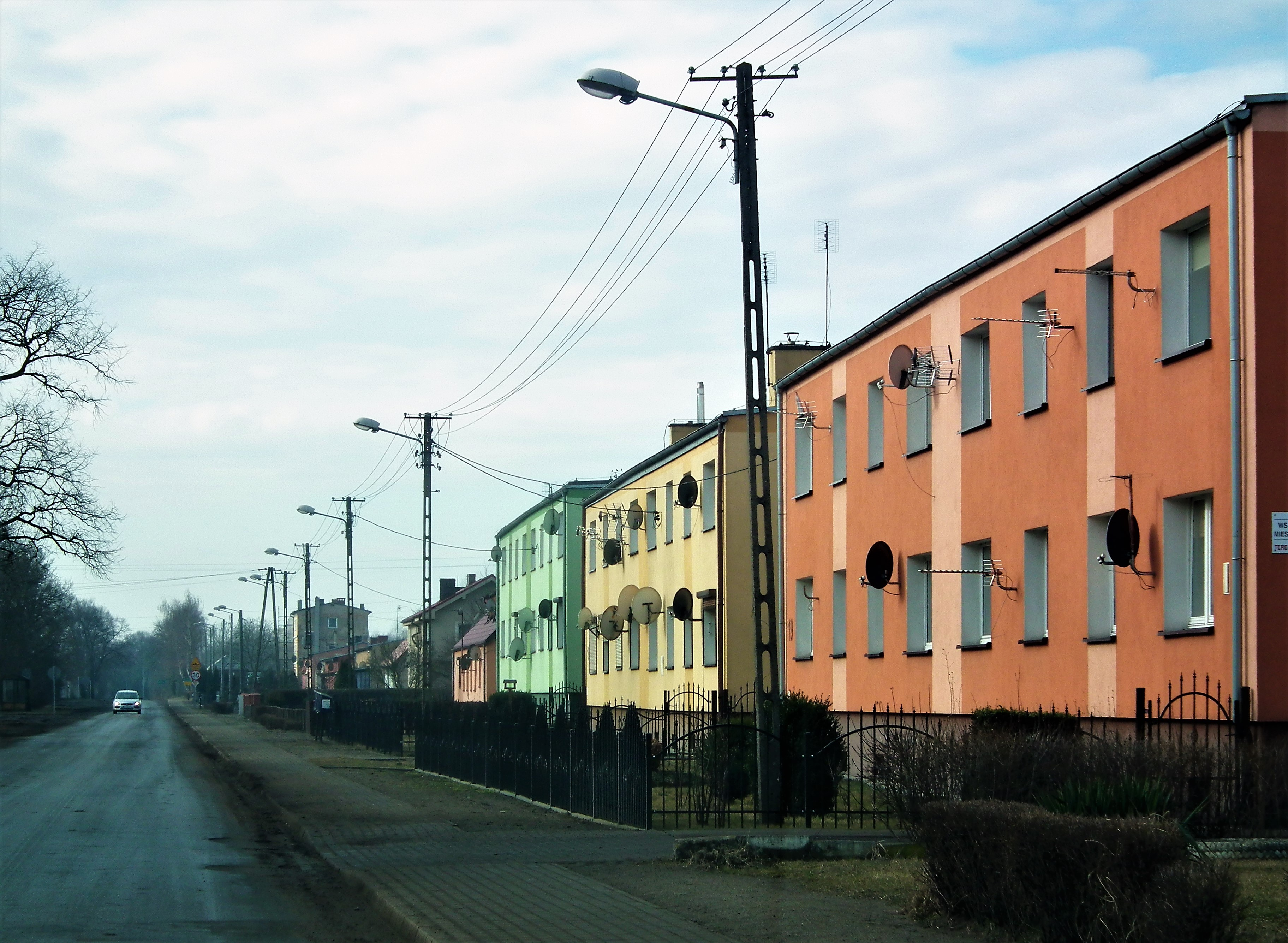 Główna ulica Piotrowa Pierwszego.